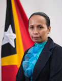 Noémia Sequeira, Abgeordnete des Nationalparlaments Osttimors